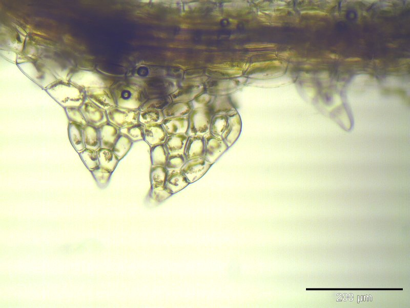 Moor-Kopfsprossmoos (Cephalozia connivens), Flankenblatt, 250x vergrößert